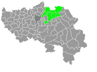 Gemeenten in het Land van Herve, provincie Luik Zelf bewerkte gemeentenkaart